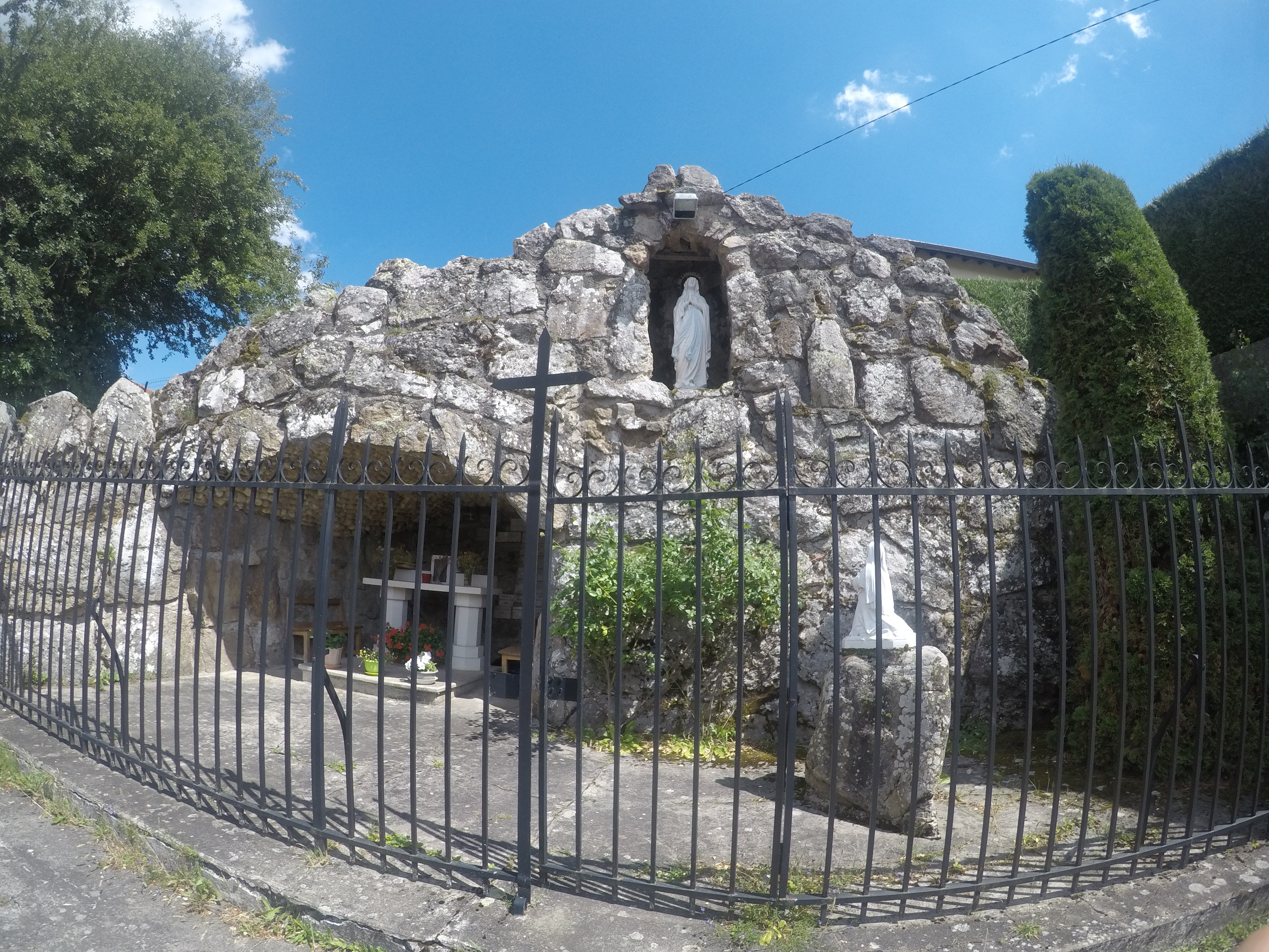 Réplique de la grotte de Notre-Dame de Lourdes, photo prise par Quentin SOUTRENON le 23/07/2020